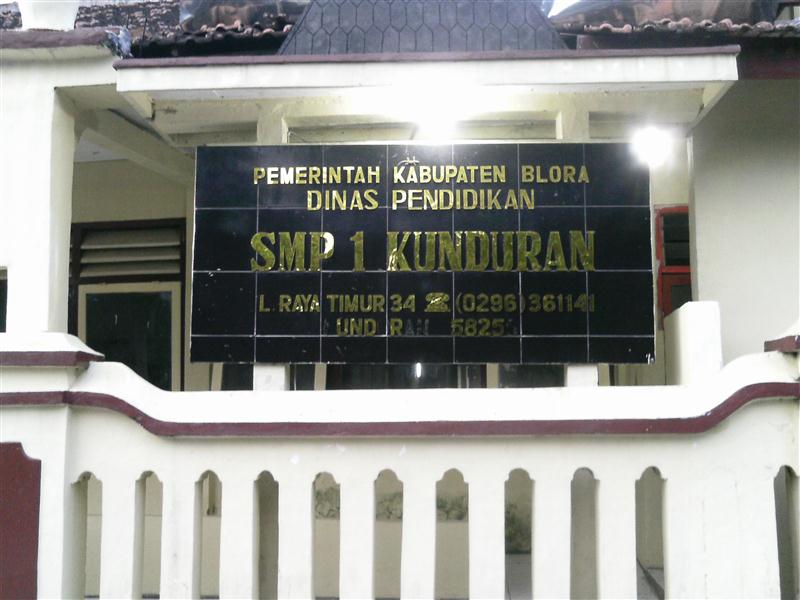 smpsiji